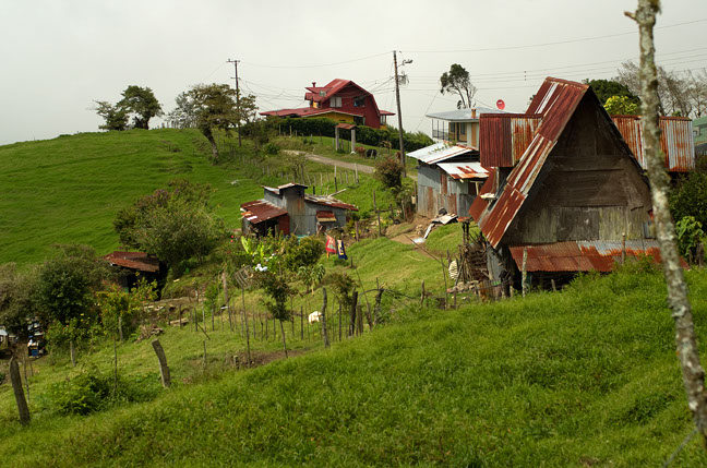 Cascajal, Costa Rica